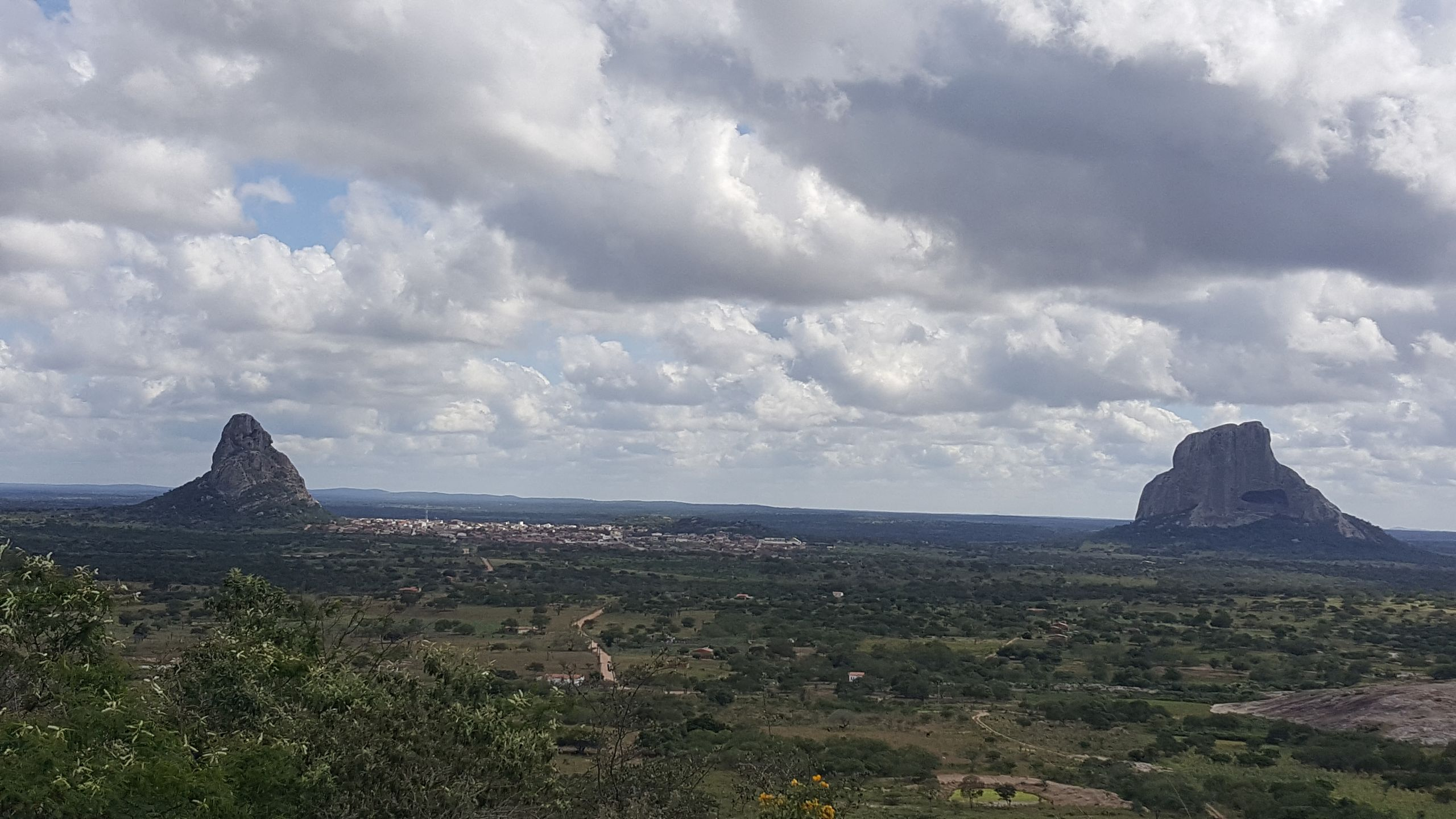 Pé de Serra - Vista da cidade a partir do Morro da Magra